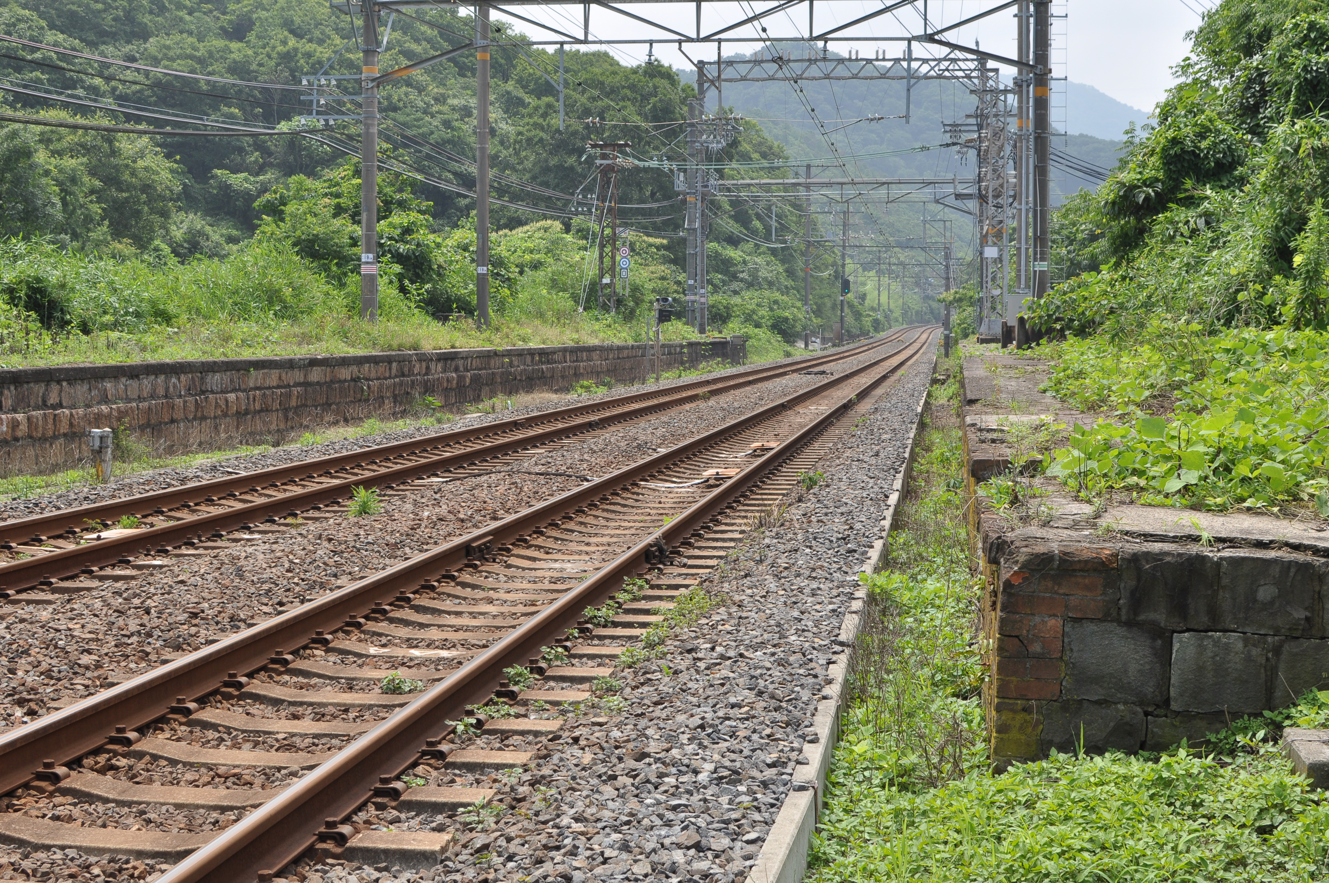 南海電鉄深日（ふけ）駅。孝子駅とみさき公園駅の間に位置するが、現在は廃駅。南海電鉄深日変電所に隣接する。